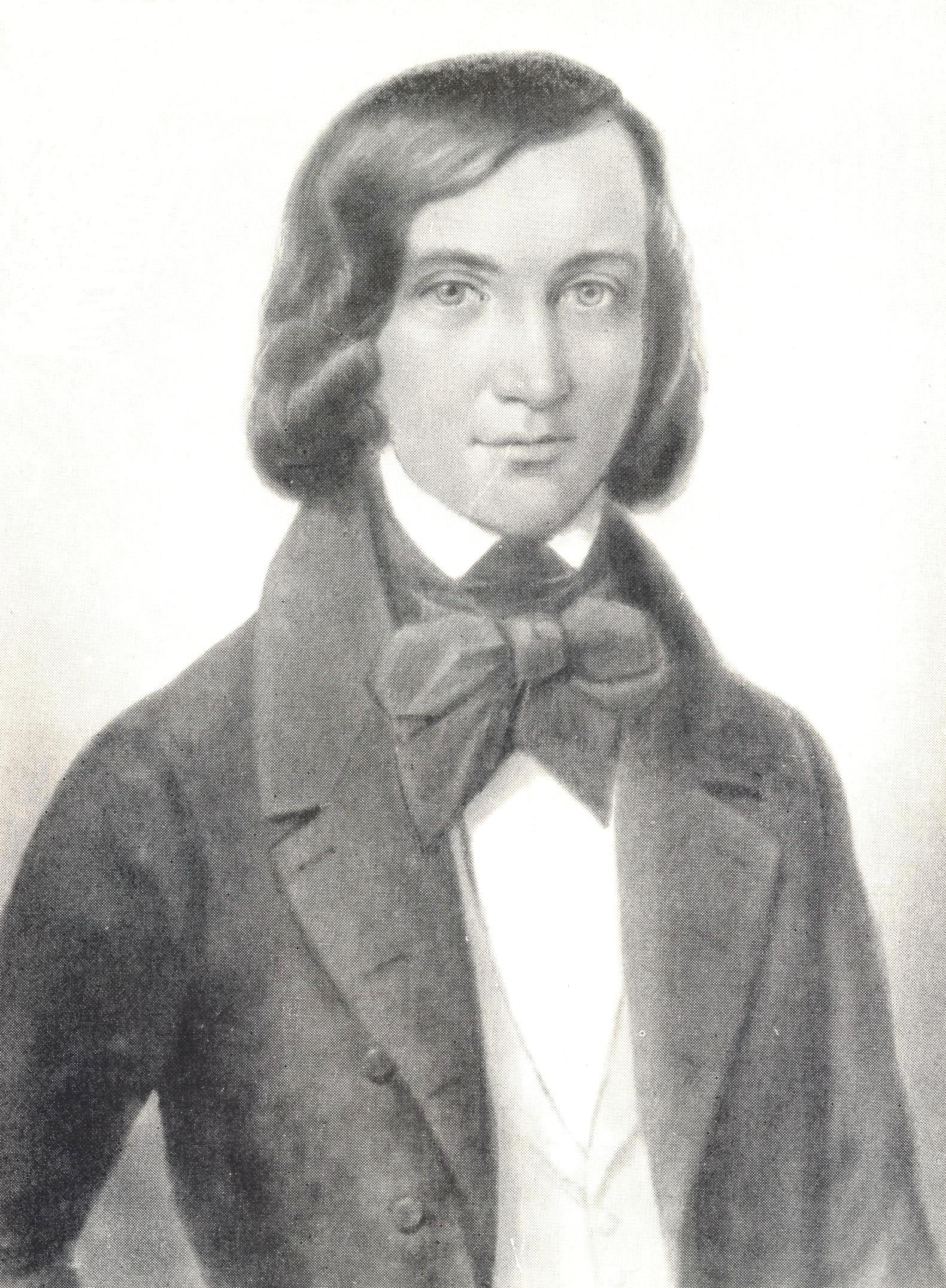 Portrait of russian philosopher and writer Nikolay Stankevich = Николай Владимирович Станкевич (1813—1840), общественный деятель, философ, литератор